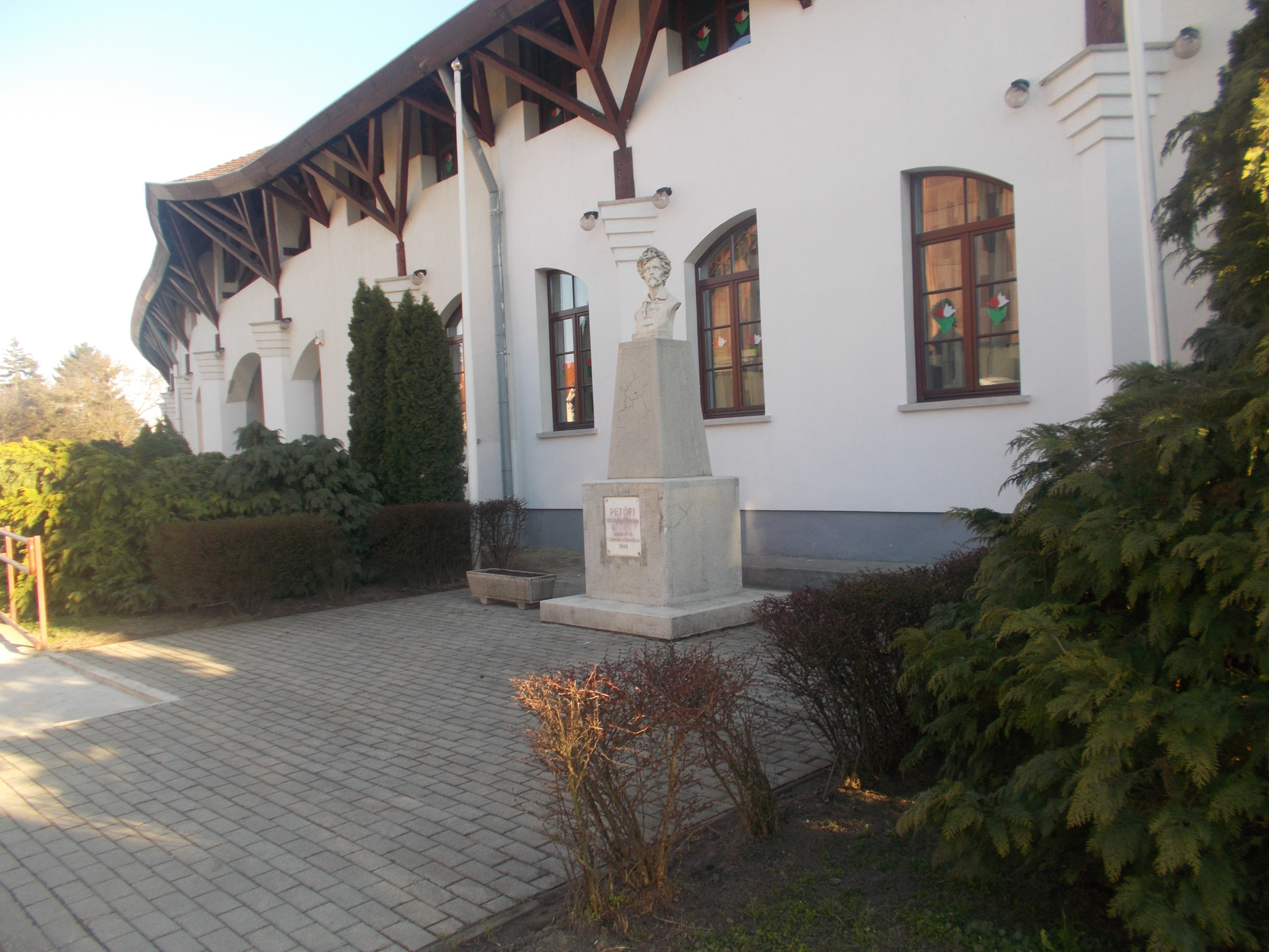 Petőfi Sándor-szobor (Csenger)